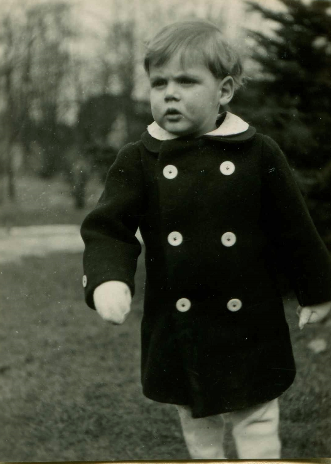 Marineblauer Tuchmantel mit Perlmuttknöpfen und abknöpfbarem Kragen in der Art der Hamburger Kinderstube.